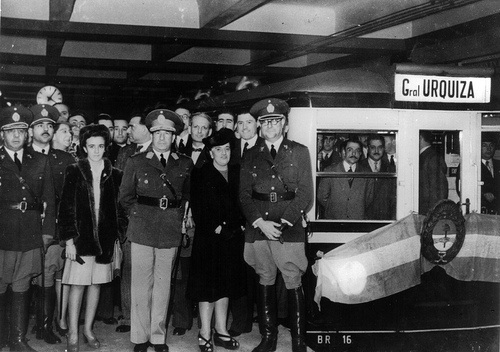 Inauguración de la línea E en Constitución, 20 de junio de 1944 (tren a General Urquiza) (Archivo General de la Nación)